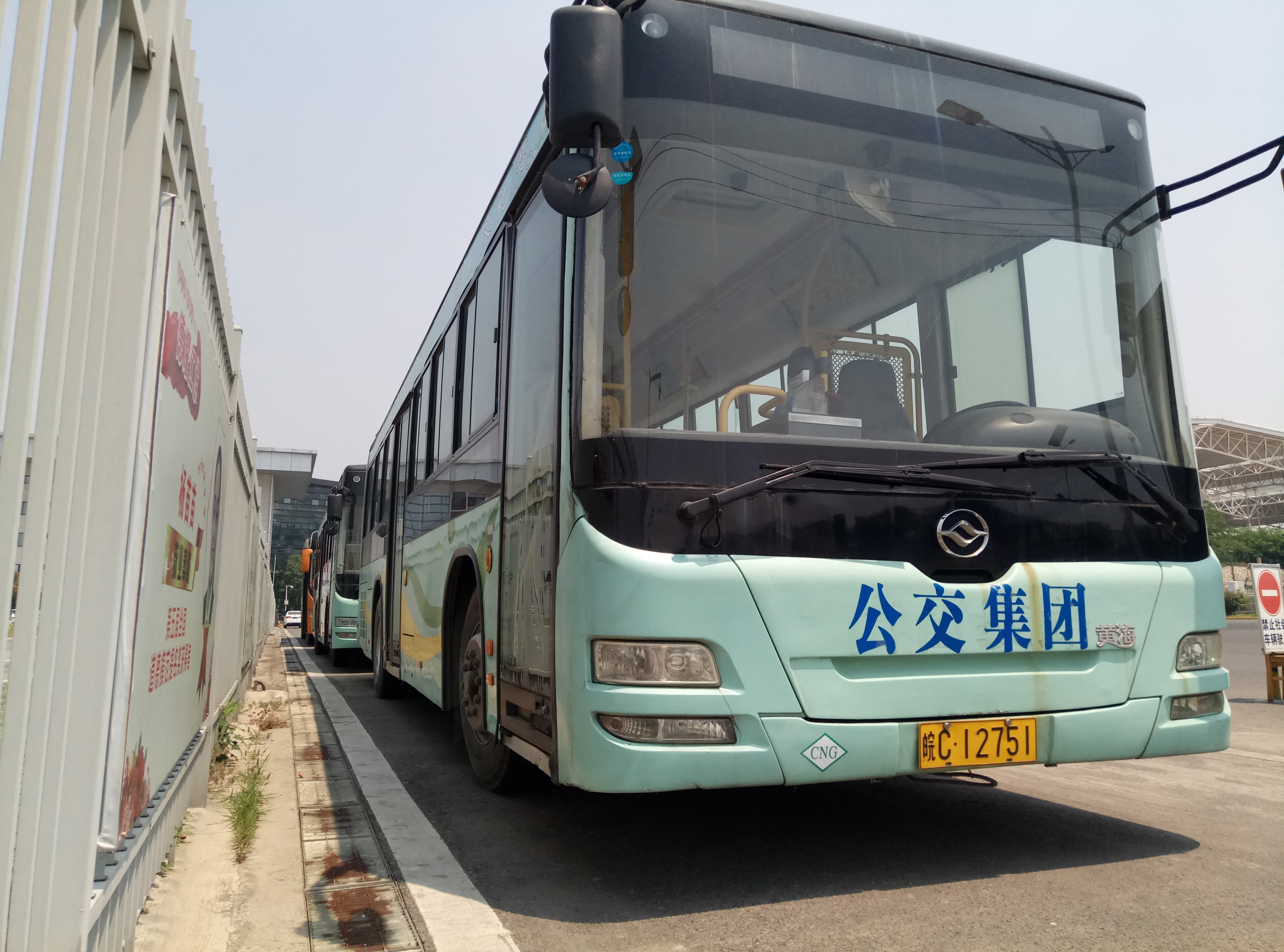 蚌埠公交集团黄海DD6109B22N天然气客车，该车型于2011年服役于我市公交集团，于2017年6月报废。